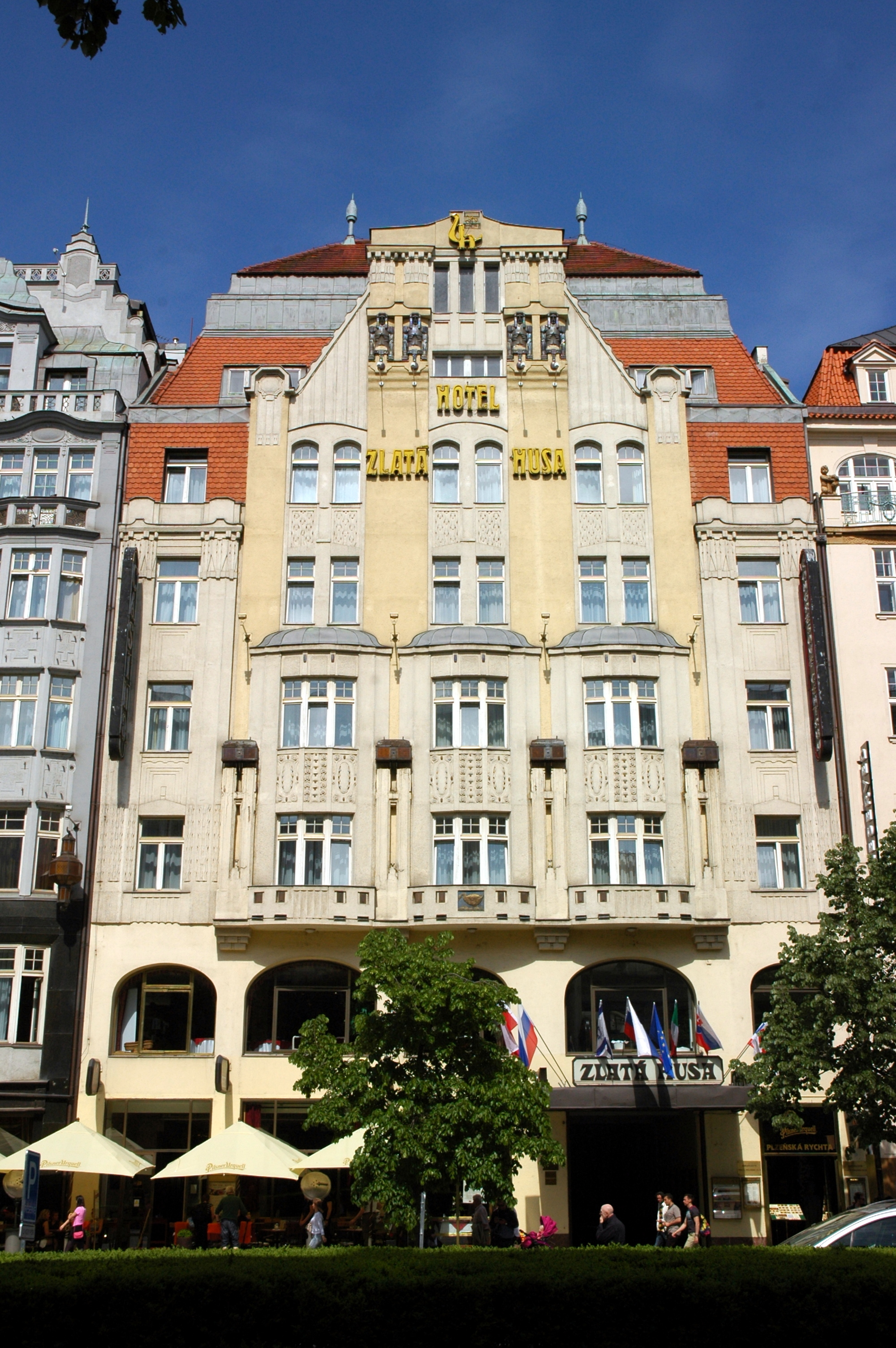 Václavské náměstí (Praha)